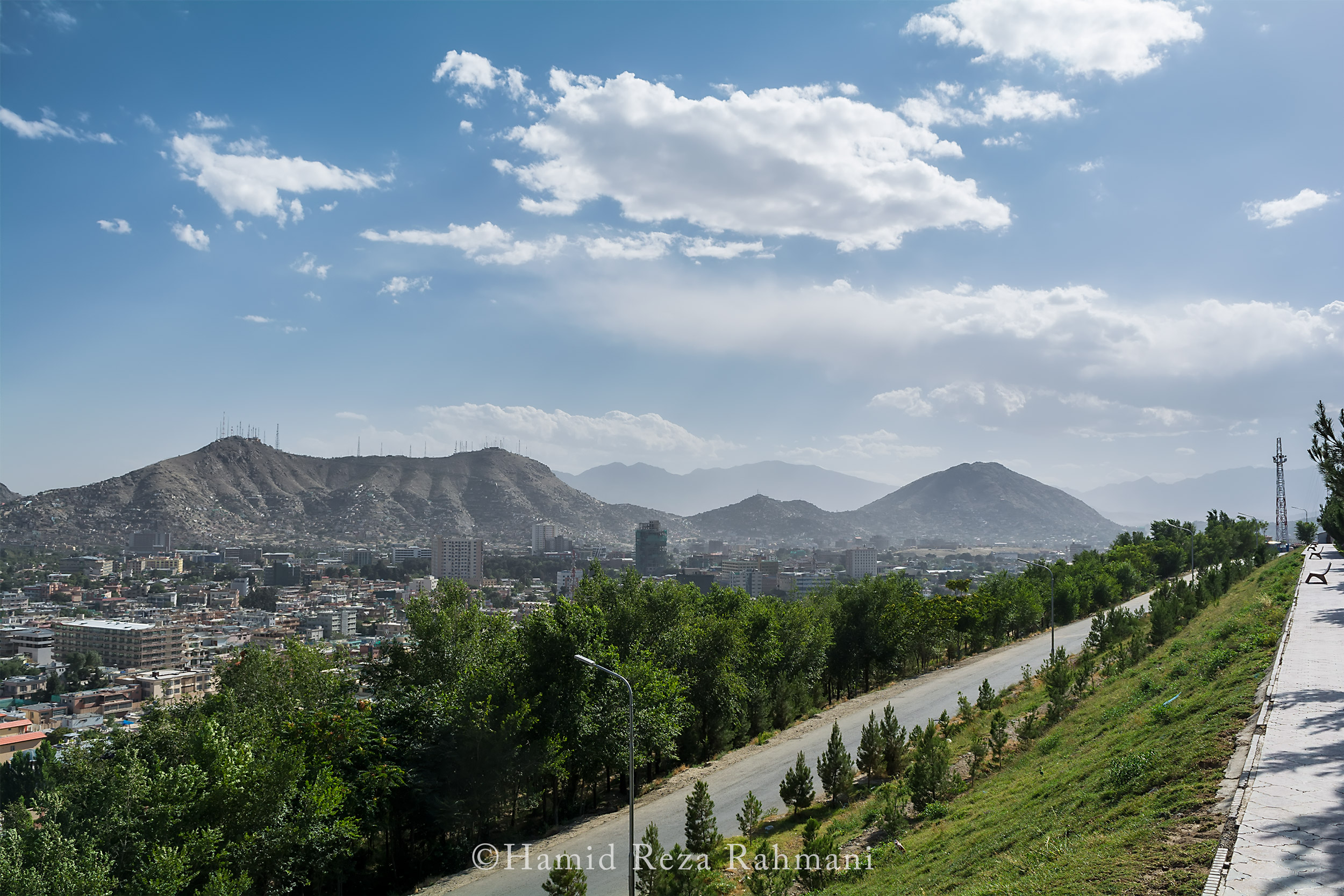 نمایی از شهر کابل از تپه وزیر اکبر خان